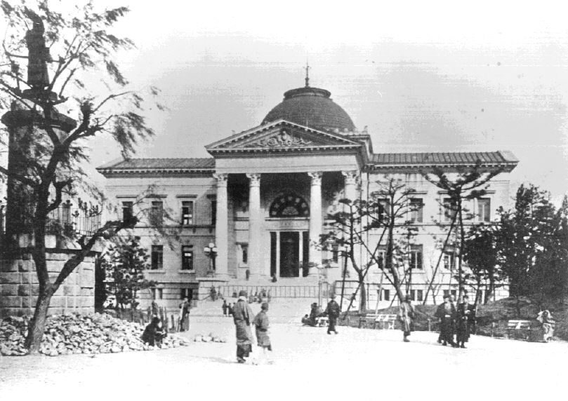 大阪市の中之島図書館。原典は『明治大正昭和の大阪写真集 3』（1909年-1910年）。大阪市立中央図書館蔵（大阪市立図書館デジタルアーカイブ）。